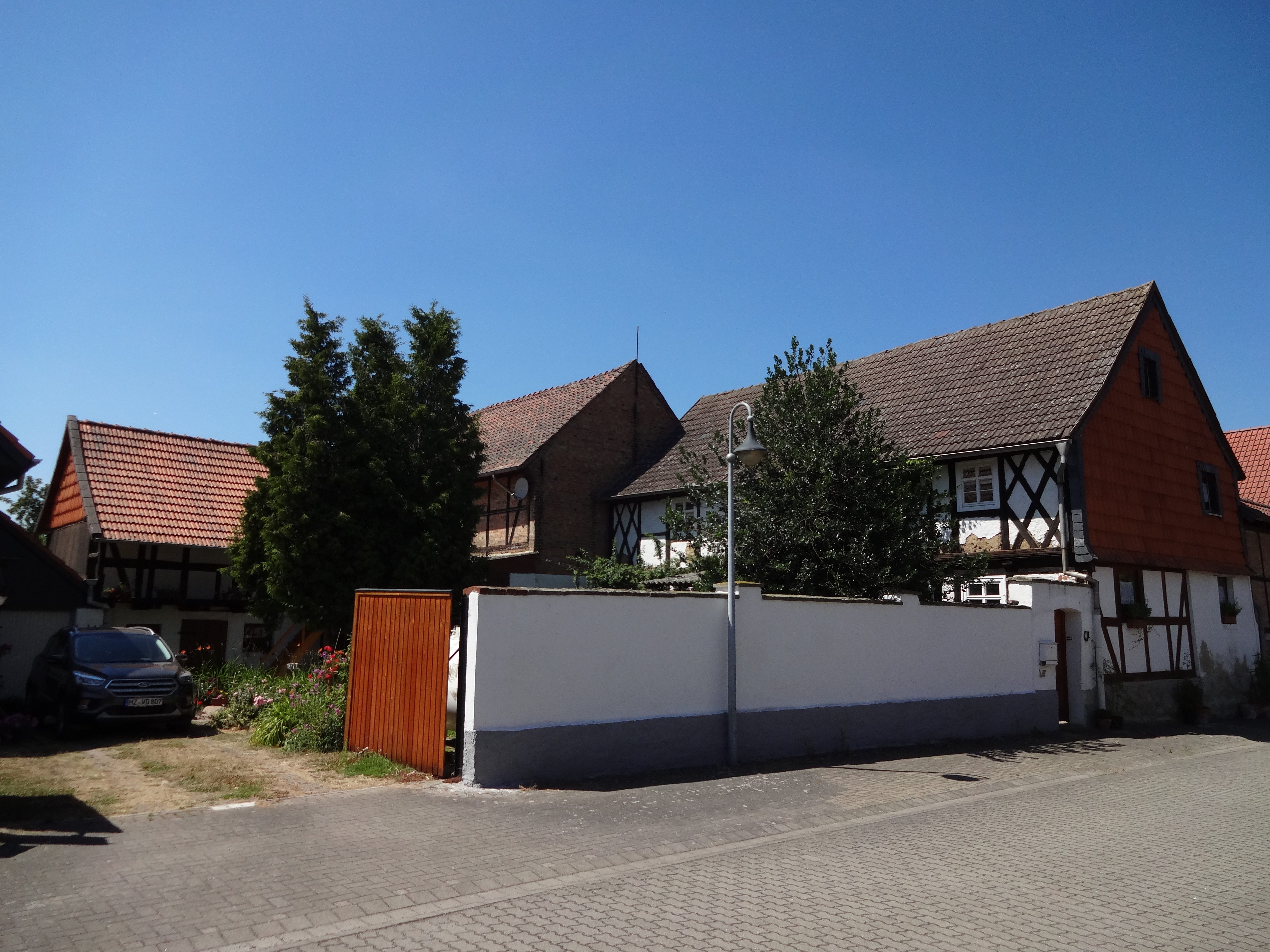 denkmalgeschütztes Bauernhaus in der Hinterstraße 3 in Dedeleben